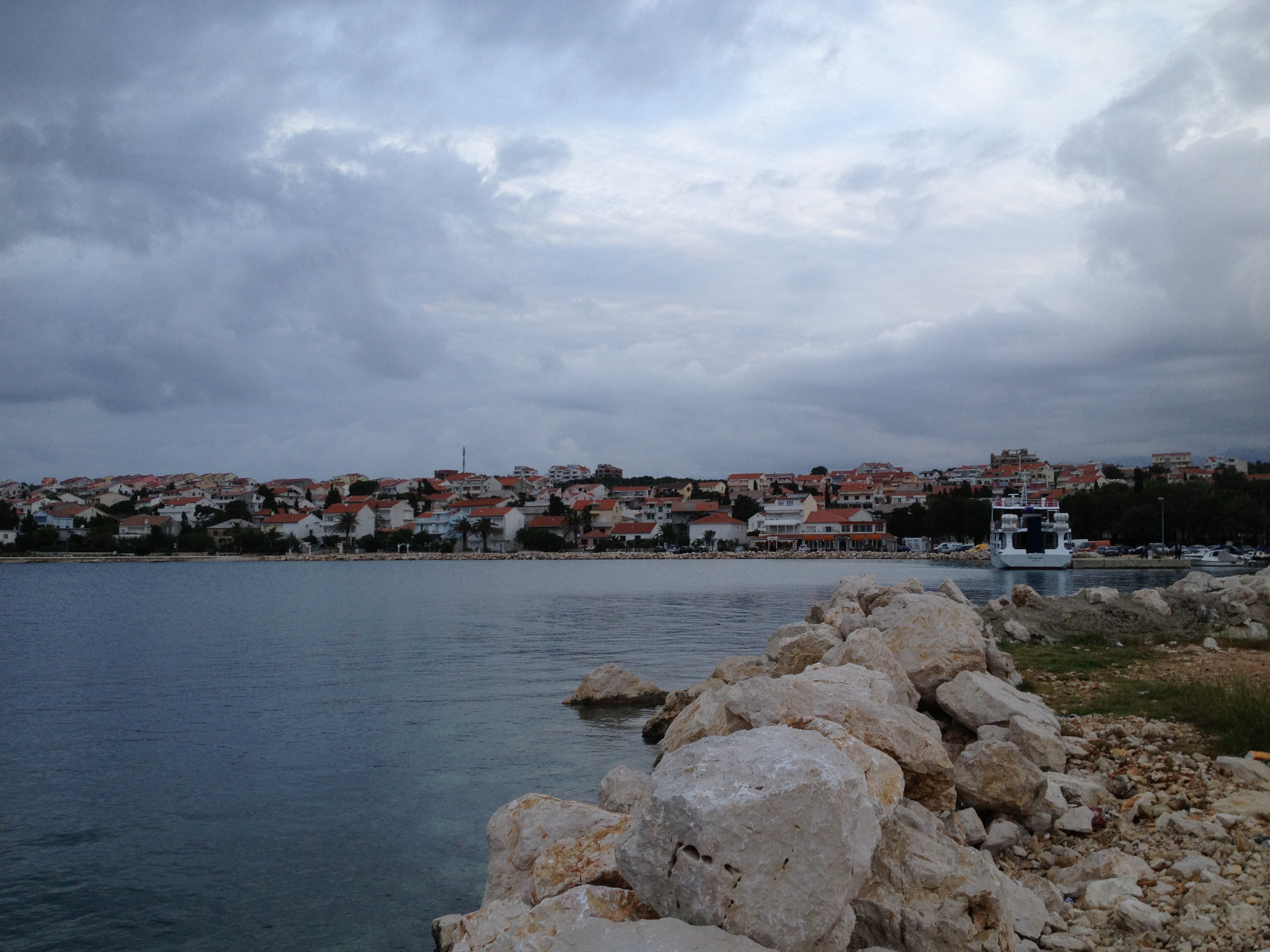 Novalja, Kroatien